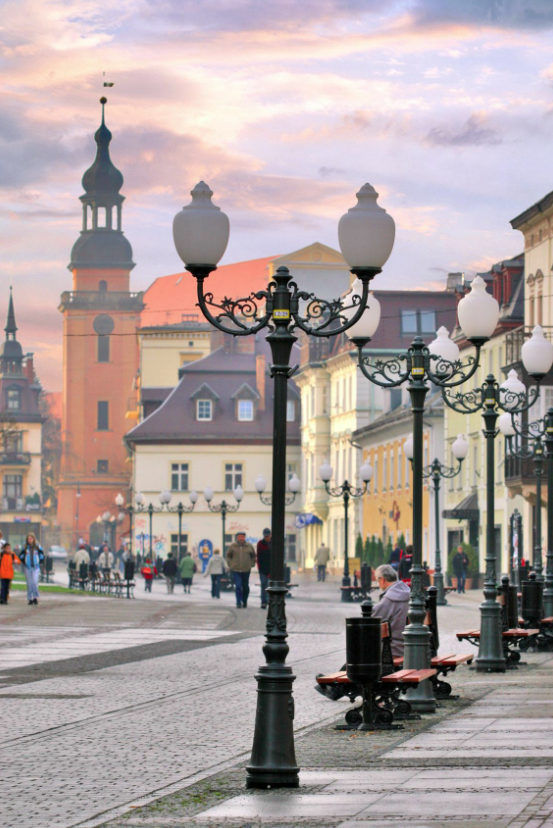 .Cieplice Promenade